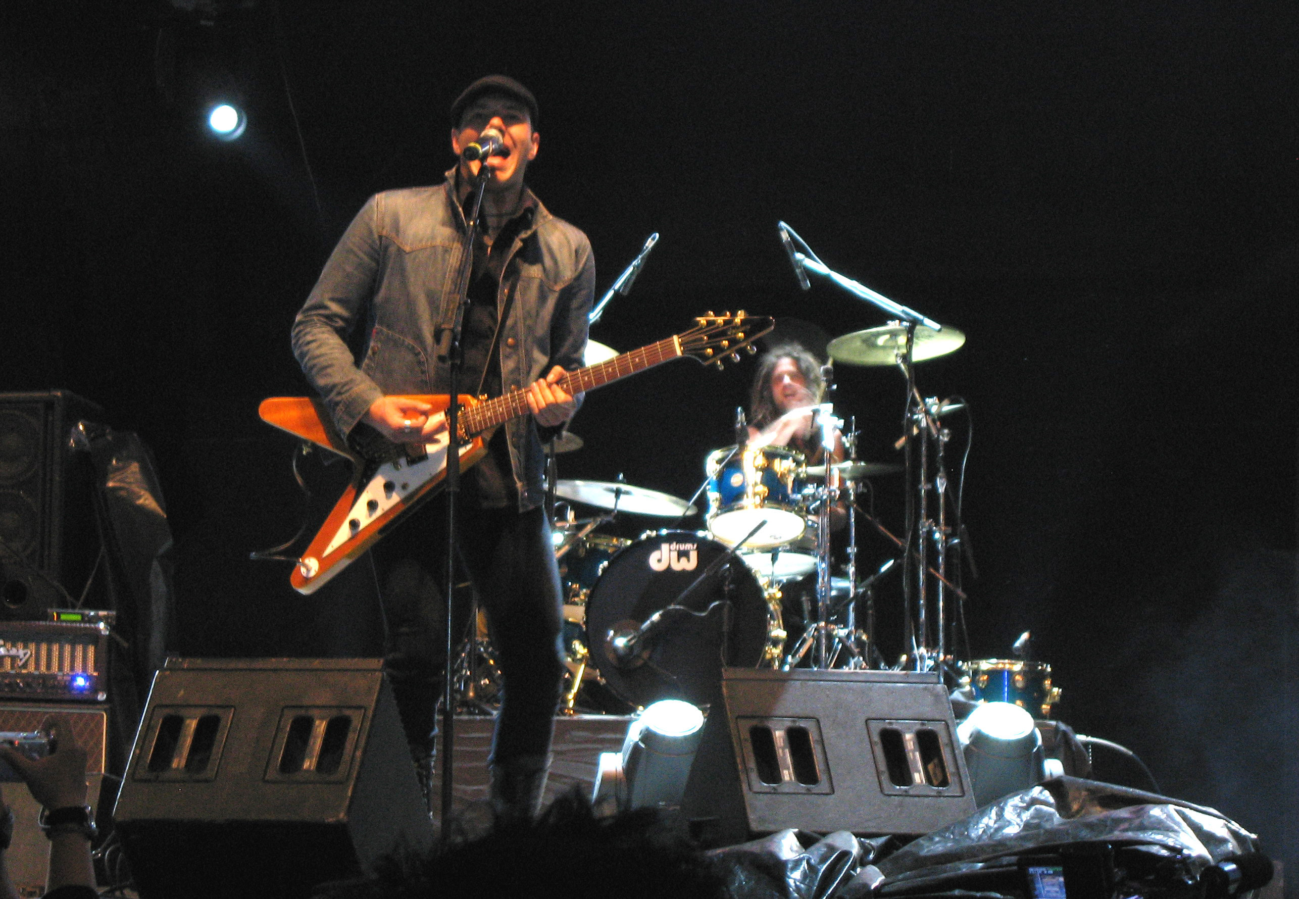 Grupo argentino Catupecu Machu en Rock al Parque 2007, Bogotá, Colombia.